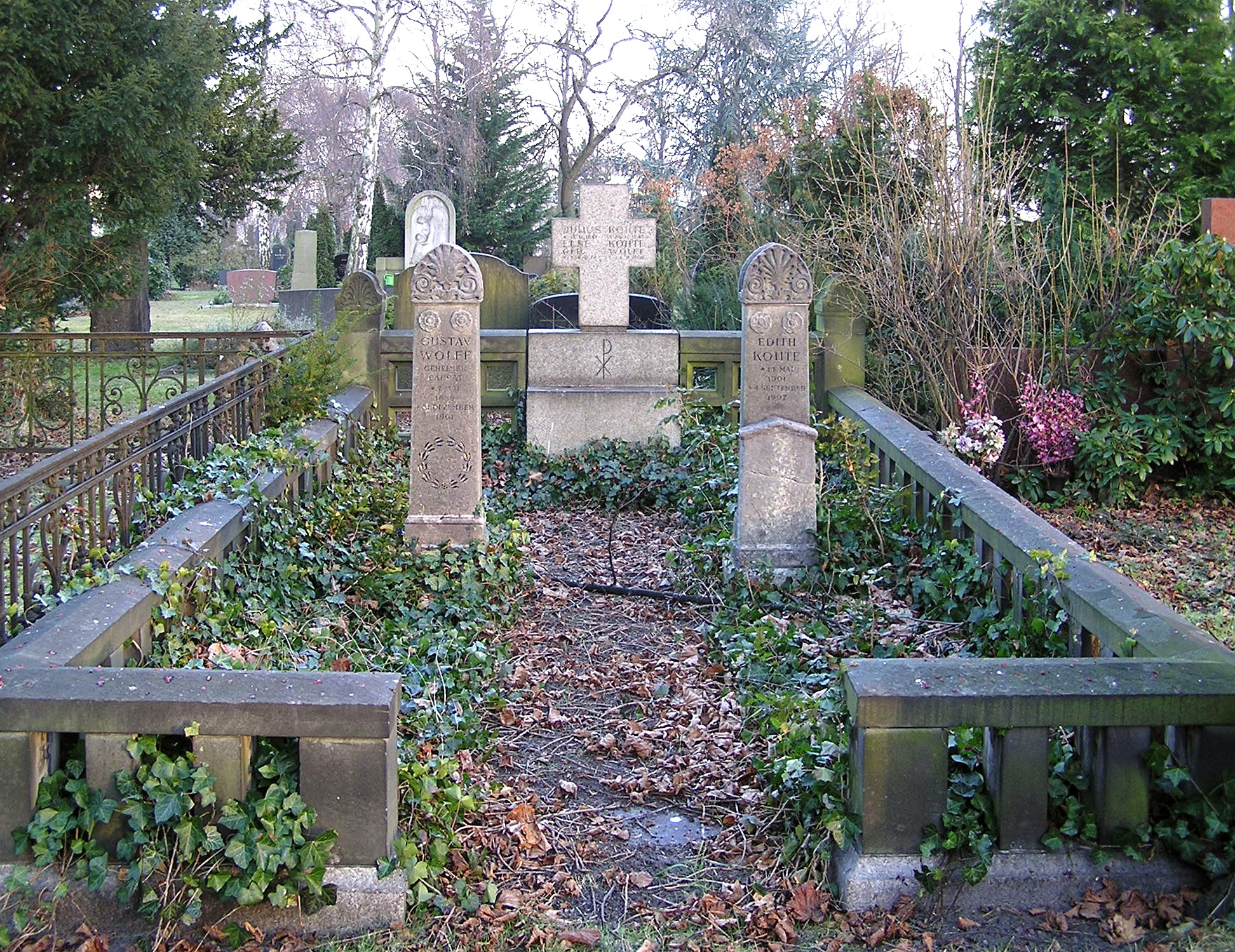 Familiengrab der Familien Kohte und Wolff auf dem Luisenfriedhof II in Berlin-Westend. Hier bestattet: Gustav Wolff (Geheimer Baurat, 1838–1907), Julius Kohte (1861–1945), Else Kohte, geb. Wolff (1876–1956), Edith Kohte (1901–1907)